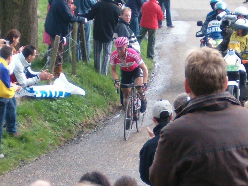 Doorkomst Steffen Wesemann op de Eyserbosweg tijdens de Amstel Gold Race 2006